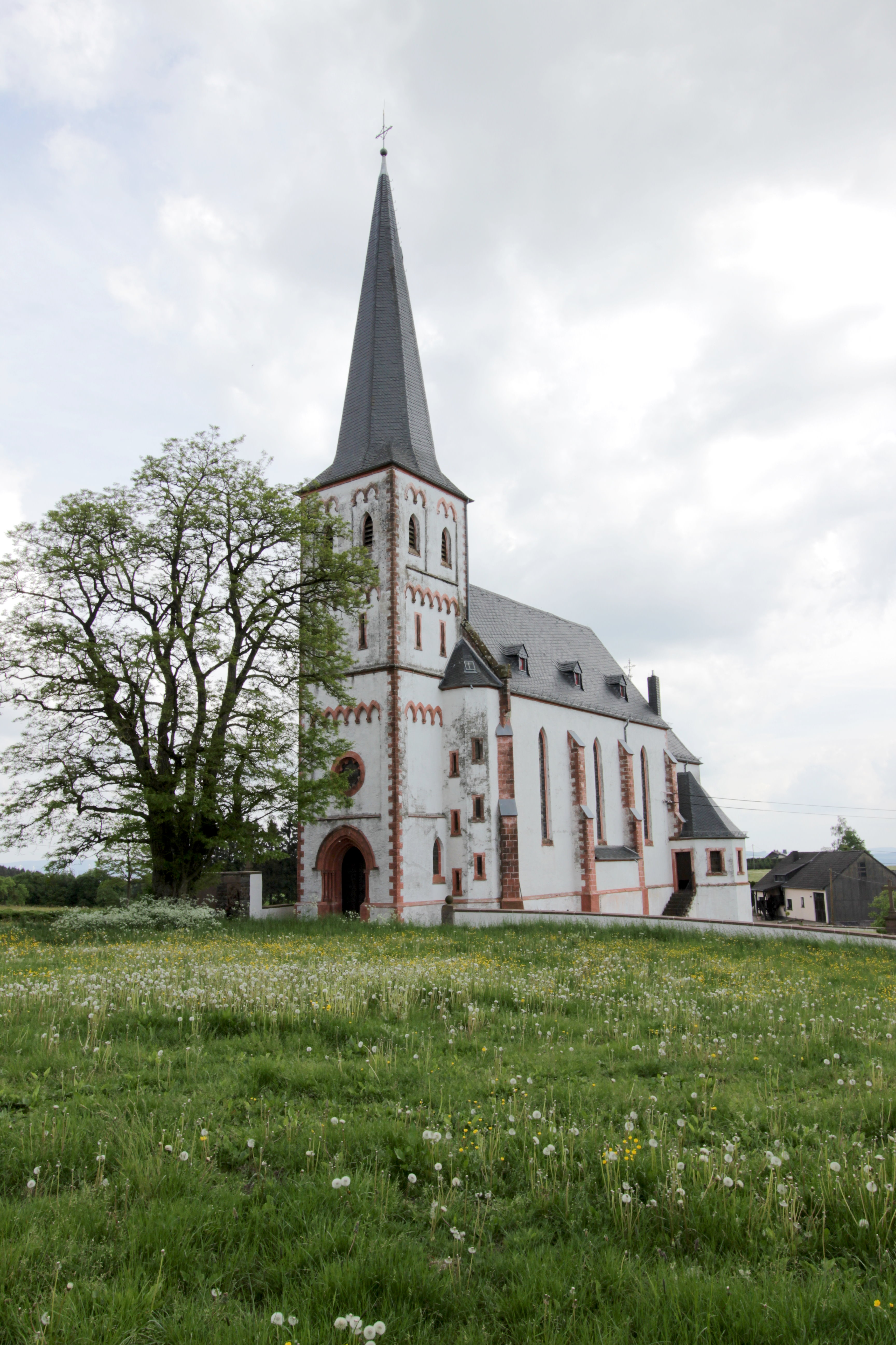 54619 Lichtenborn, Schulstraße 7. Neugotischer Saalbau mit Anbauten seitlich des Chors, 1895–97, Architekt Lambert von Fisenne, Gelsenkirchen; mit Ausstattung; auf dem Kirchhof aufwändiges Kirchhofskreuz, vor 1900; kleine Grabkreuze, 19. Jahrhundert, und Pfarrergrabstein, Schiefer, um 1814; Kreuzigungsbildstock, bezeichnet 1788. Aufnahme von 2018.